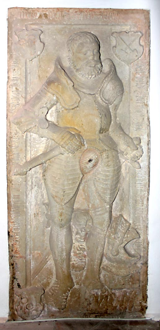 Die Marienkirche in Büdingen, Innenansicht - Epitahp